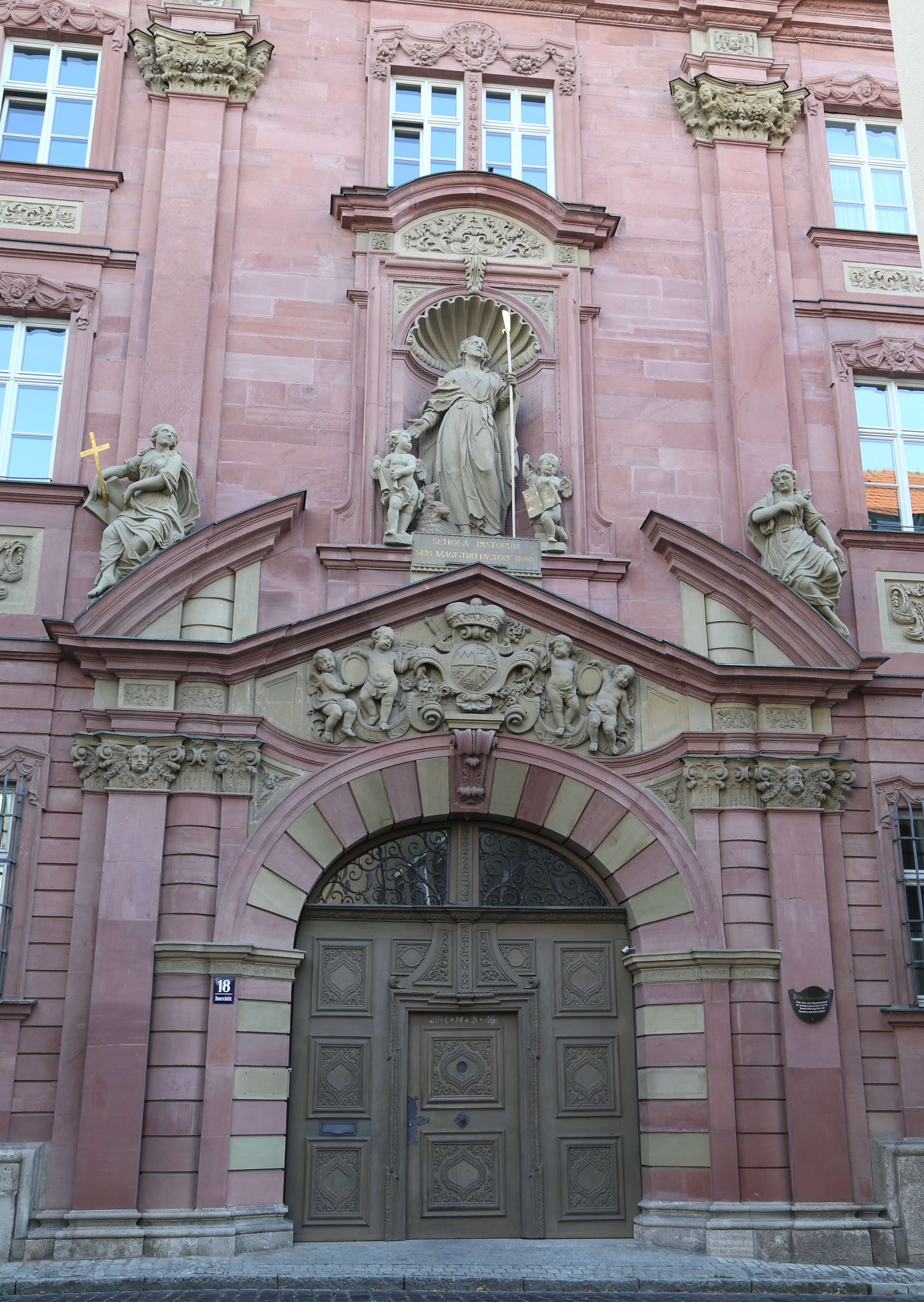 Domerschulstraße 18, Würzburg; Ehemaliges Jesuitenkolleg, jetzt Bischöfliches Klerikalseminar, Dreiflügelanlage über dreieckigem Grundriss, Nordflügel 1715–1719 von Joseph Greissing, Westflügel 1724–1729 von Balthasar Neumann, Südflügel 1788